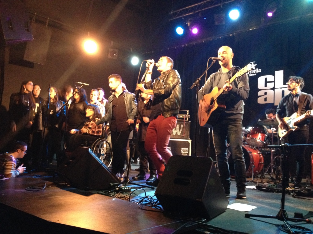 Foto d'un discconcert a Mataró al 2016